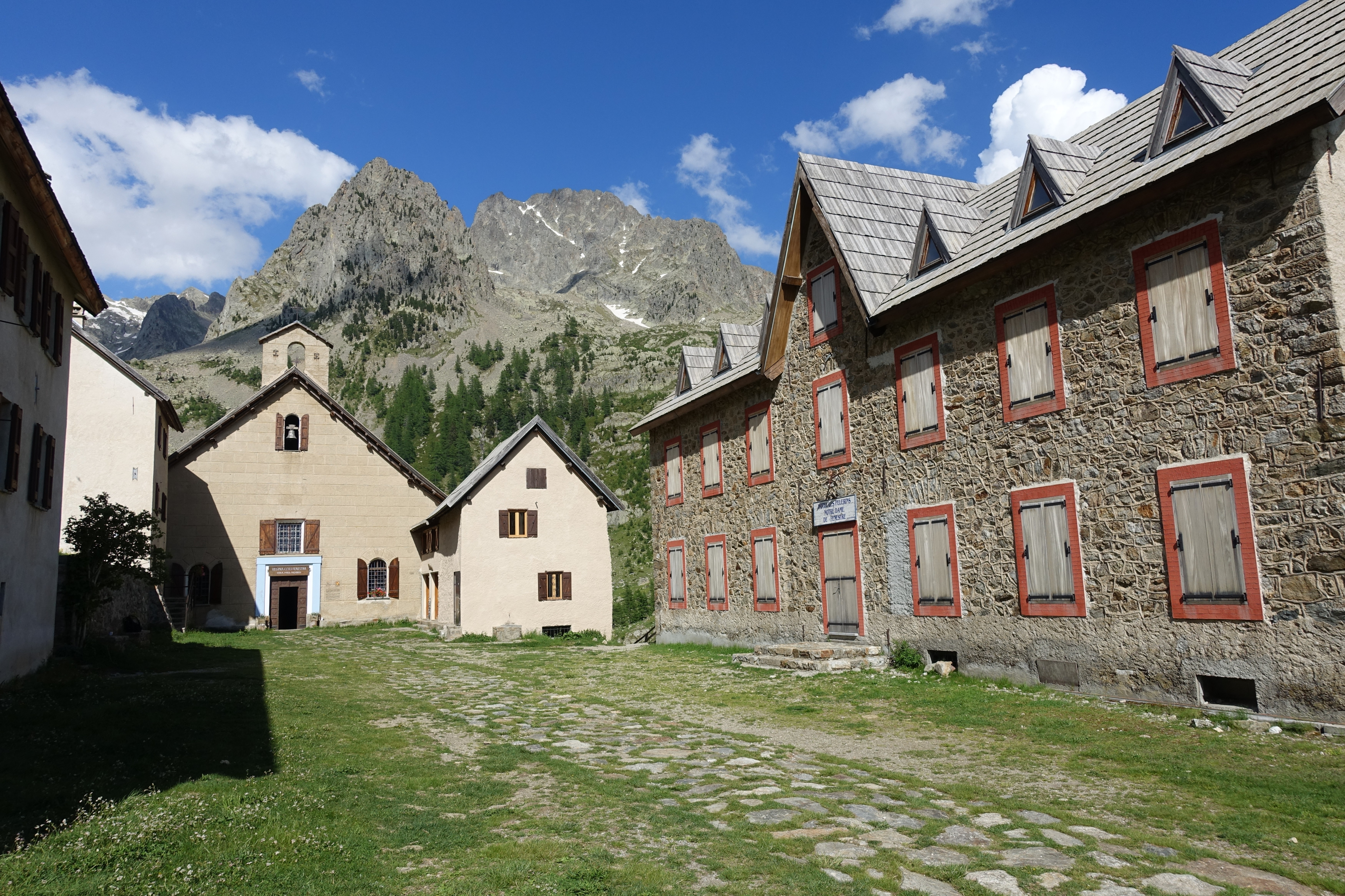 Sanctuaire de Madone de Fenestre, Parc national du Mercantour, Alpes-Maritimes